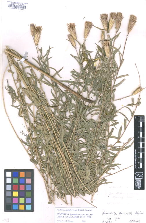 Archiserratula forrestii como Serratula forrestii - Espécimen del herbario del Natural History Museum, London